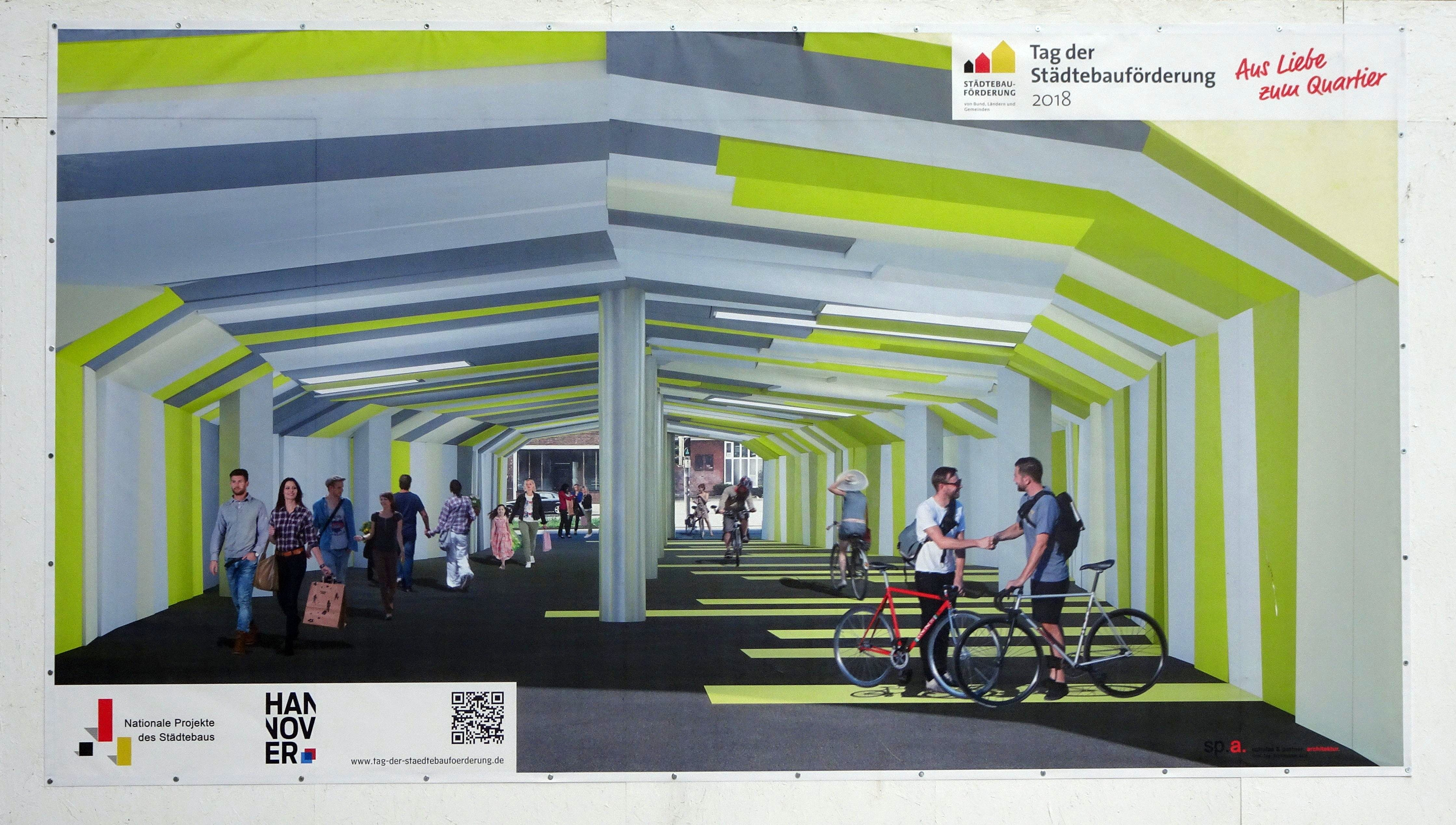 Ihme-Zentrum Plakat Durchwegung 2018